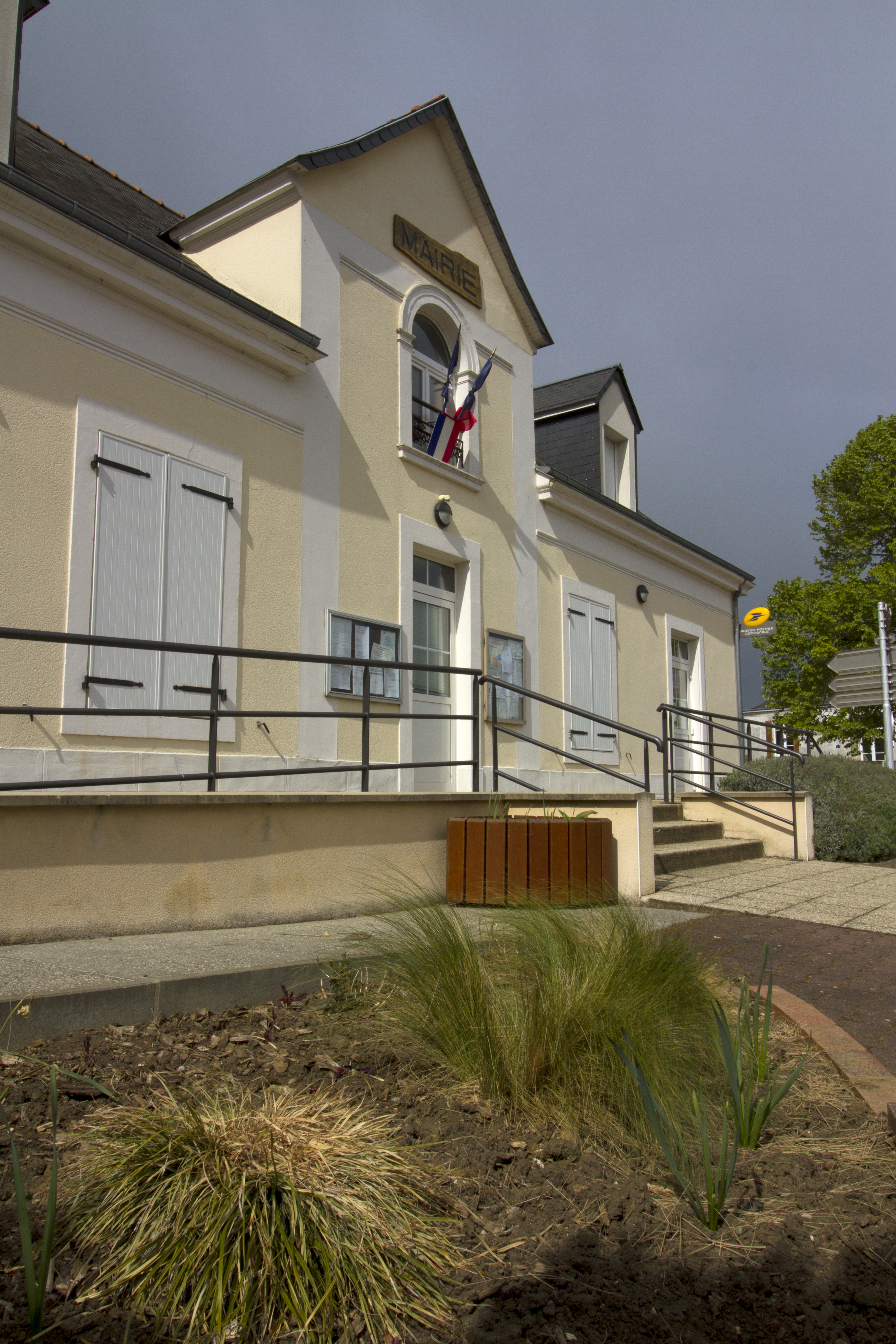 Mairie de La Chapelle-Saint-Rémy